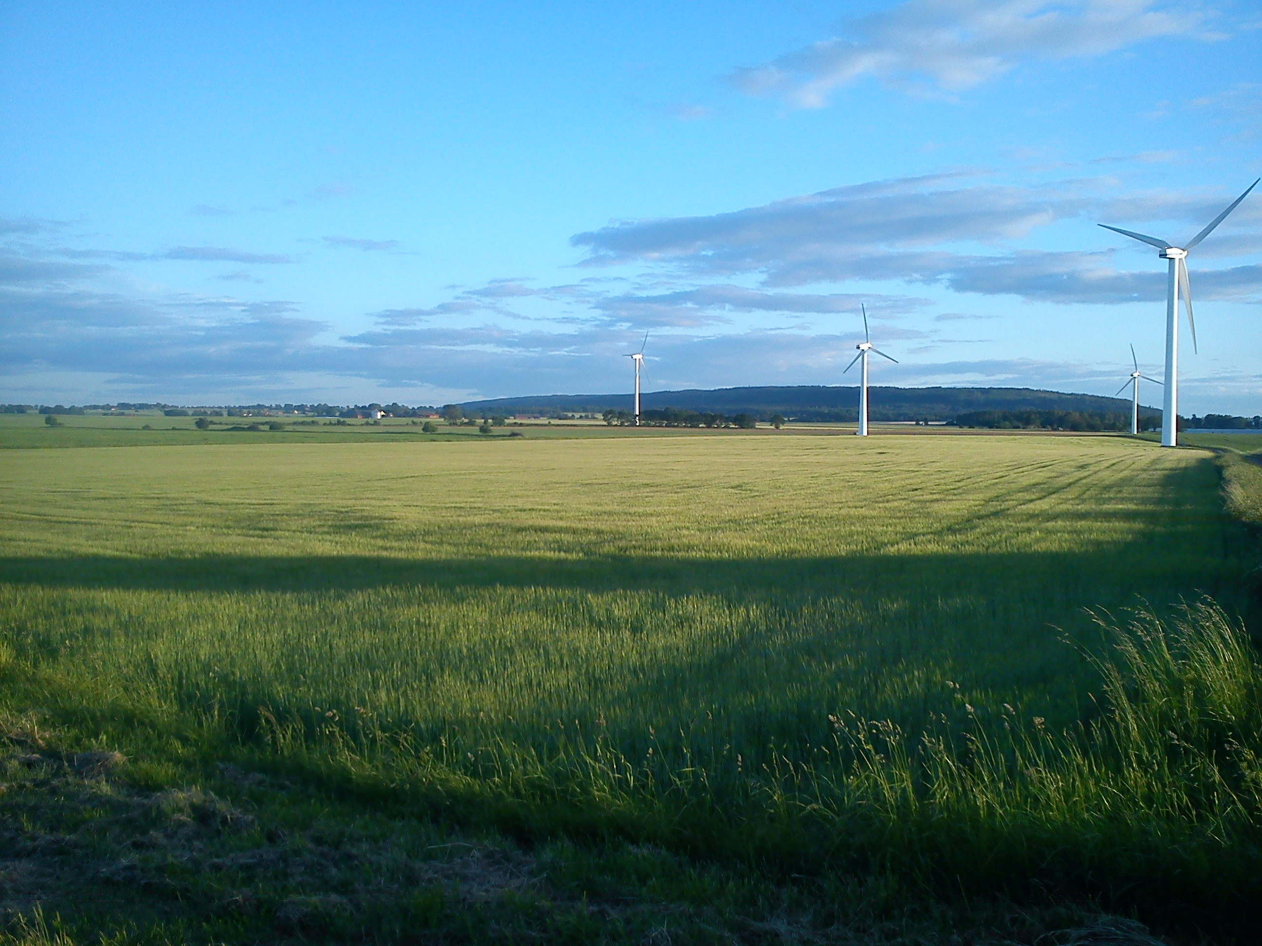 Vy över östgötaslätten utanför Rogslösa. I bakgrunden syns Omberg.